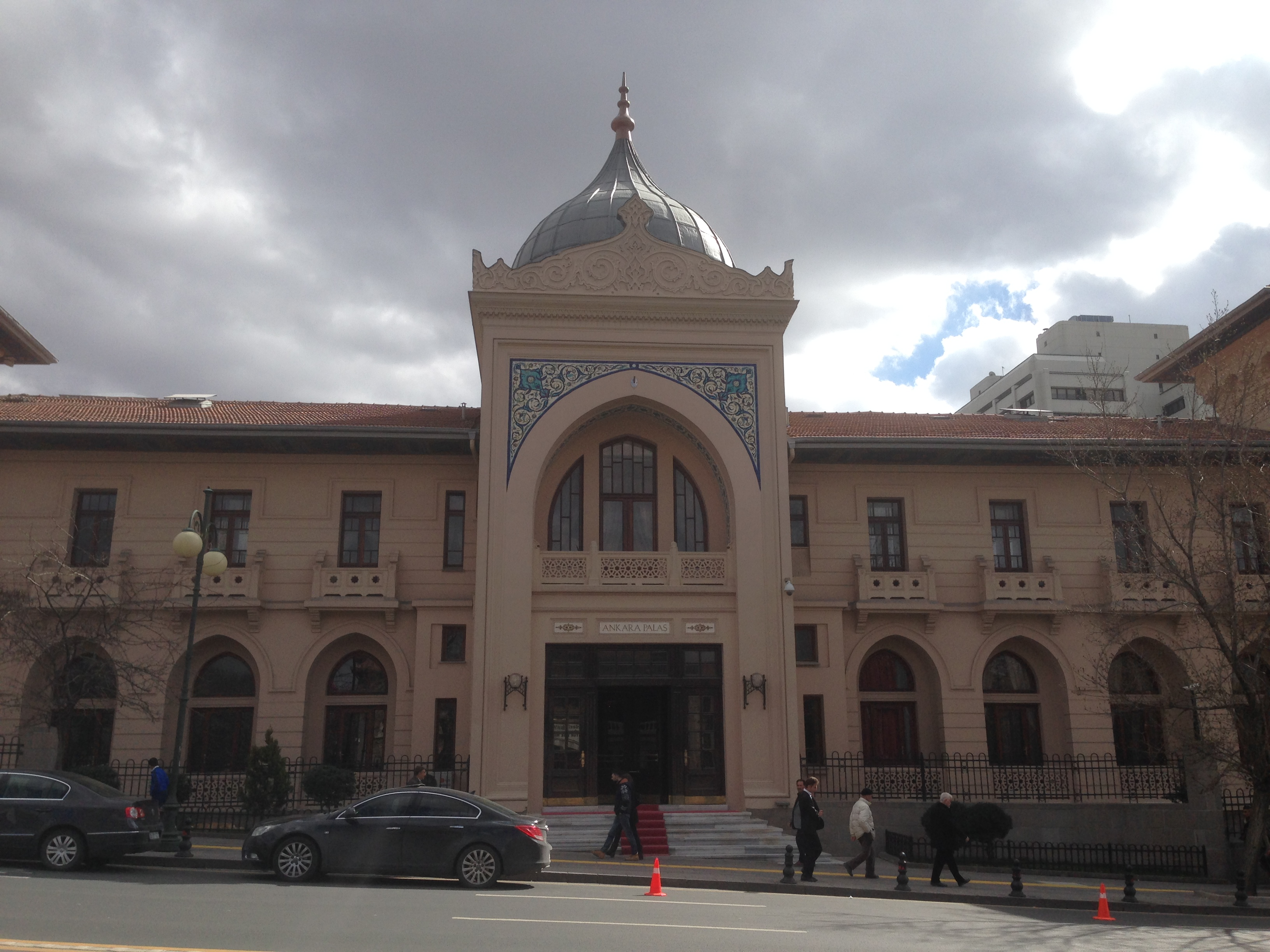 Ankara Palas, Devlet Konukevi